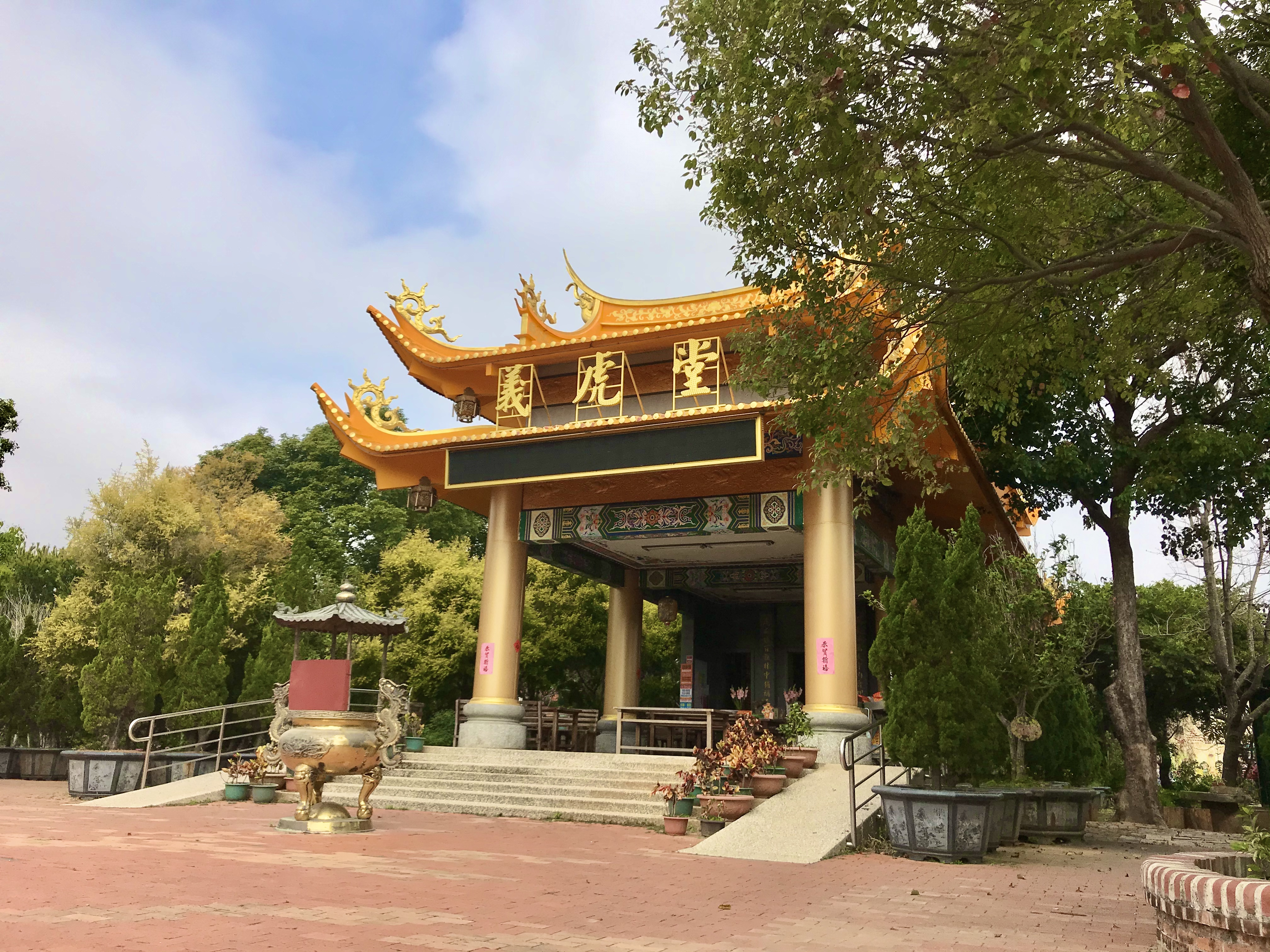 義虎堂斜照